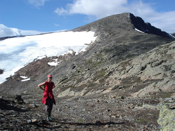 Dalsideglaciären på Mohtseretjåhkes södra sluttning